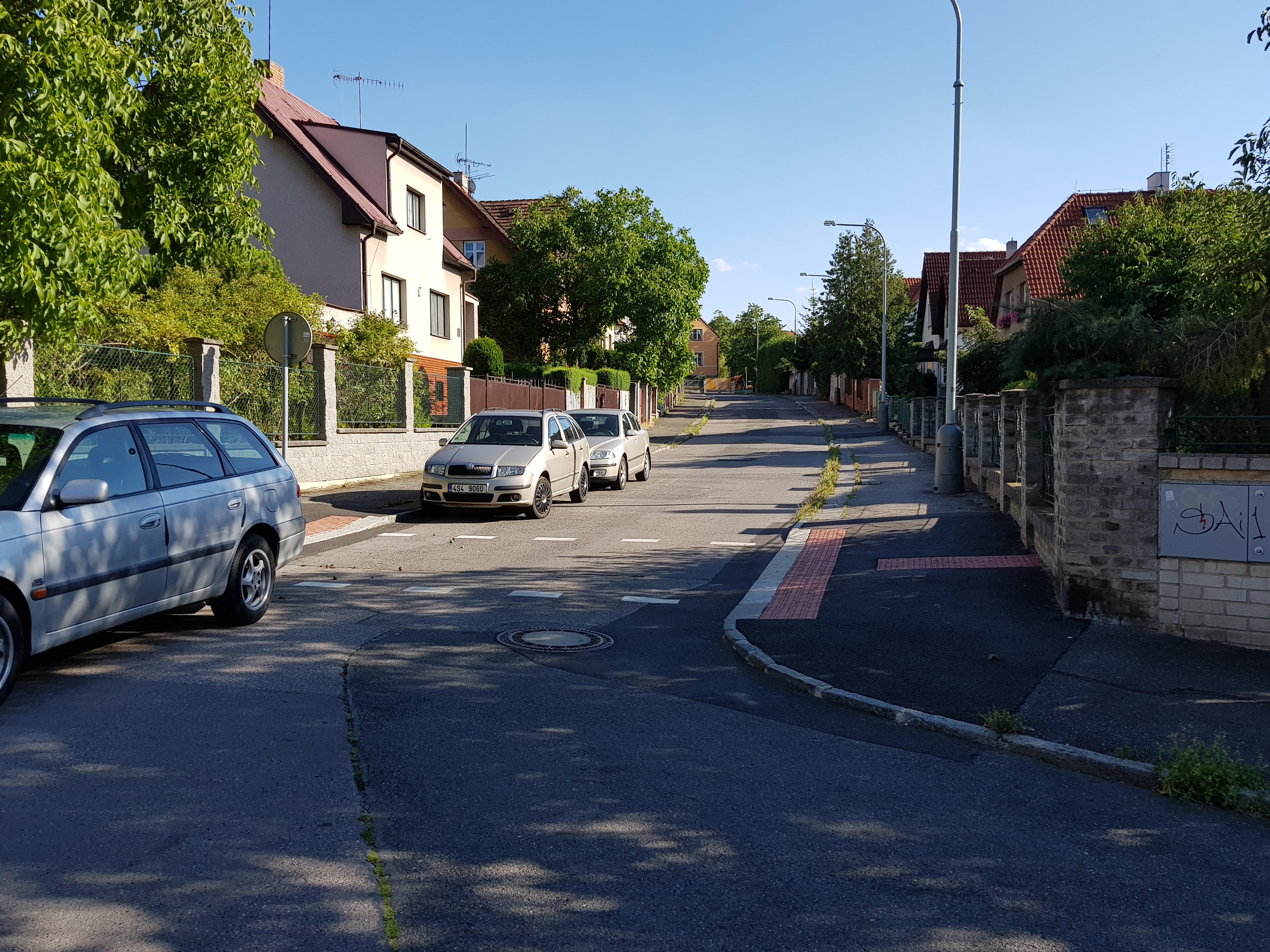 Ulice Liblická, Praha 14-Hloubětín, pohled od ulice Klánovická na jih